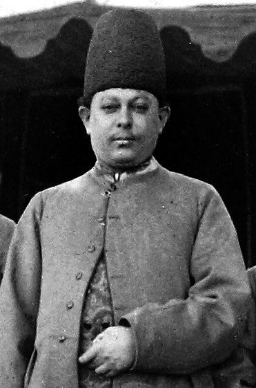 تصویر برداشت شده از کتاب موسیقی ایران در سده گذشته